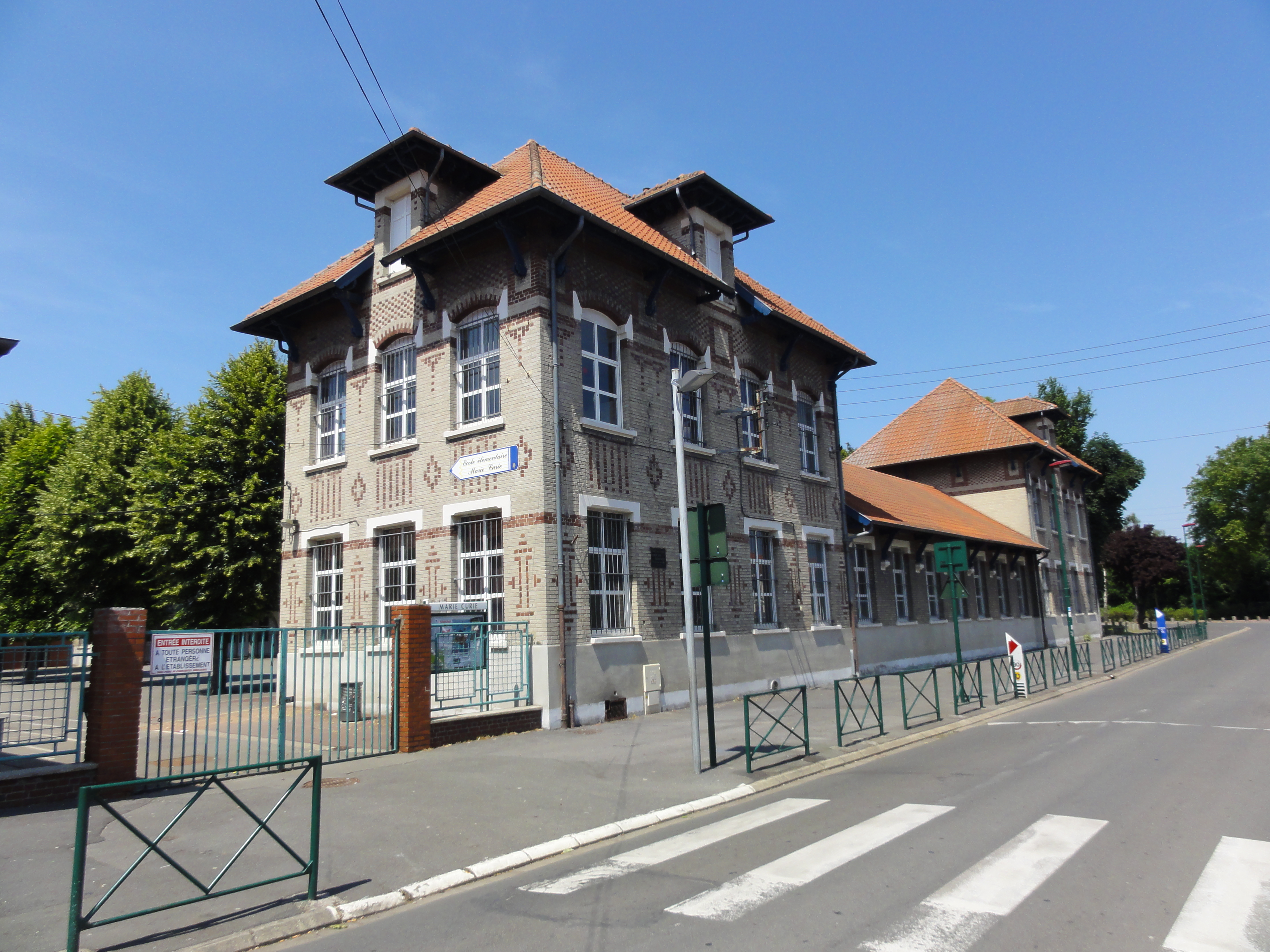 Écoles des cités de la fosse n° 9 de la Compagnie des mines de Lens dans le bassin minier du Nord-Pas-de-Calais, Lens, Pas-de-Calais, Nord-Pas-de-Calais, France. Ces écoles sont inscrites sur la liste du patrimoine mondial par l'Unesco le 30 juin 2012 et y constituent en partie le site no 63.